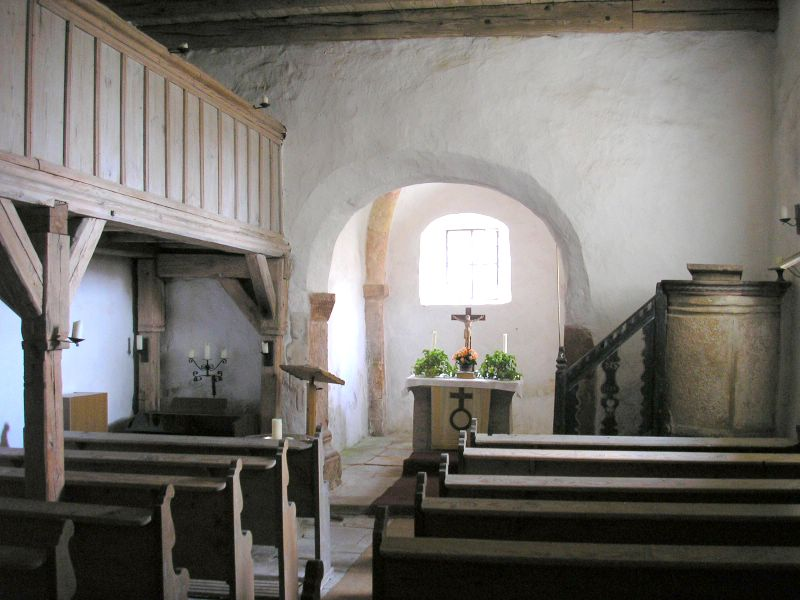 Obermerzbach (Landkreis Haßberge, Unterfranken) / Obermerzbach, Lower Franconia, Germany. Filialkirche St. Michael, Langhaus und Chor / Church St. Michael, Nave and choir. Eigene Aufnahme, Juni 2006 / Own photo, June 2006